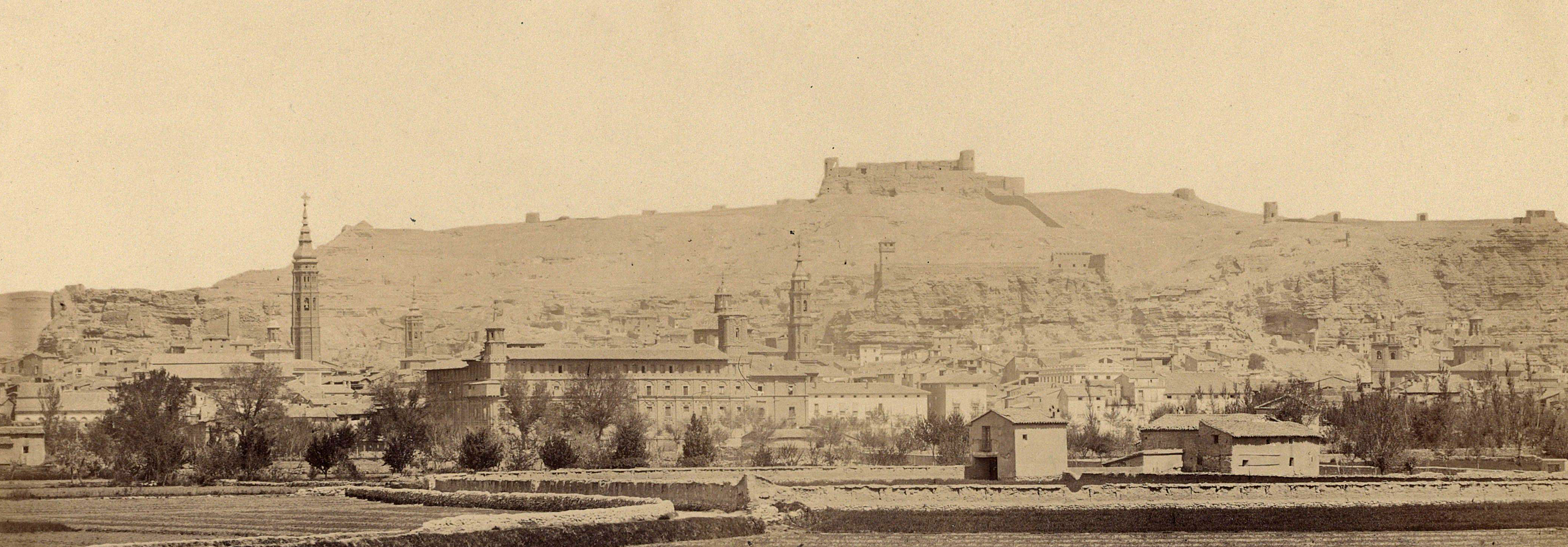 J. Laurent, Calatayud. n.º 14, ca. 1870? Positivo en papel albúmina.